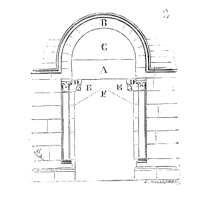 ... On sait que pour soulager les linteaux des portes, les architectes terminaient les pieds-droits par des corbeaux qui diminuaient de toute leur saillie la portée de ces linteaux monolithes (voy. fig. 2). Bien que ces linteaux A fussent déchargés par les archivoltes B, cependant ils avaient encore à porter le tympan C; parfois ils se brisaient sous cette charge, surtout lorsqu'ils ne pouvaient être faits de pierre résistante ...